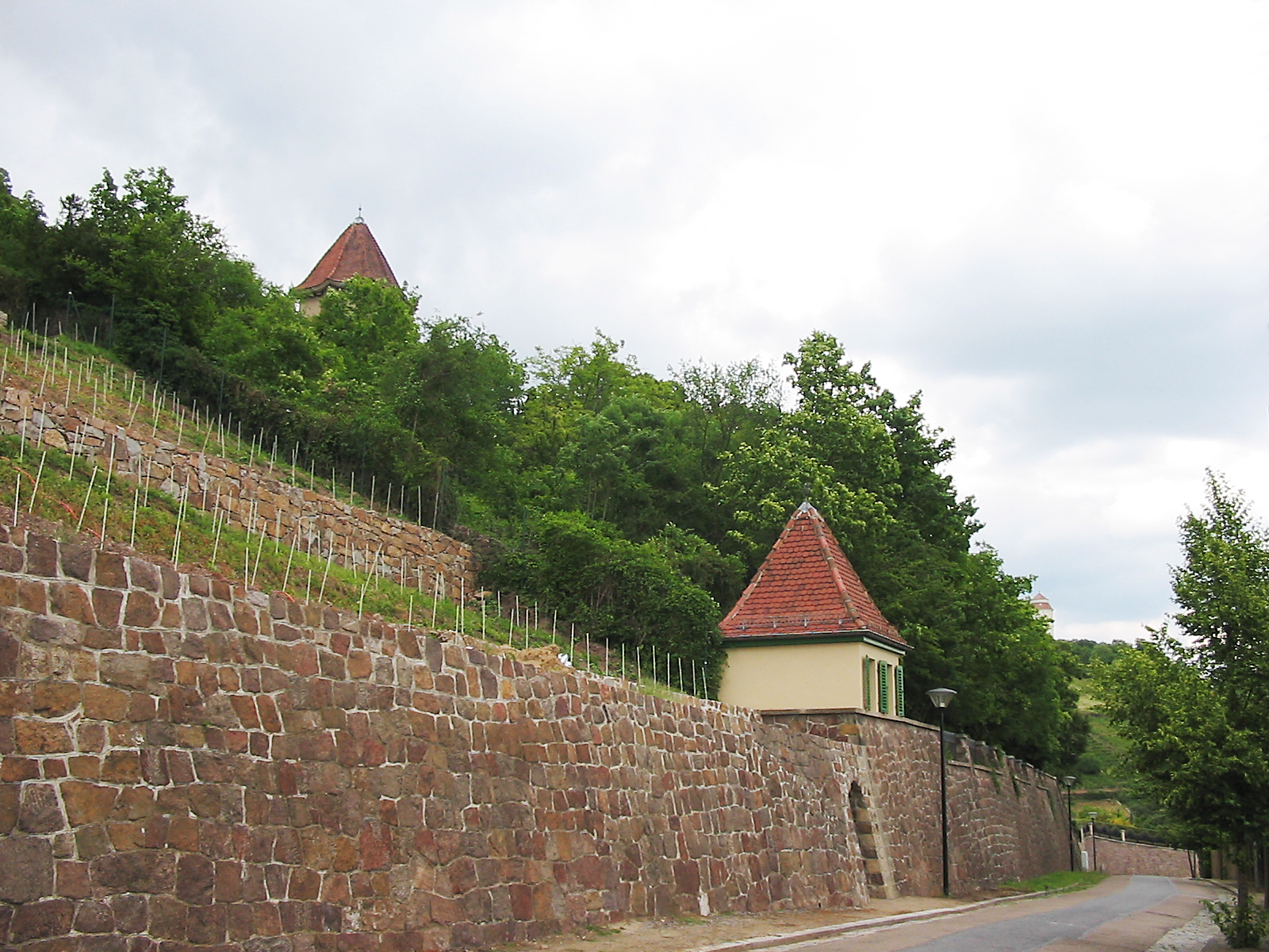 Radebeul, Pavillon an der südwestlichen Grundstücksecke der Meyerburg, Blick die Straße Altfriedstein hinunter.